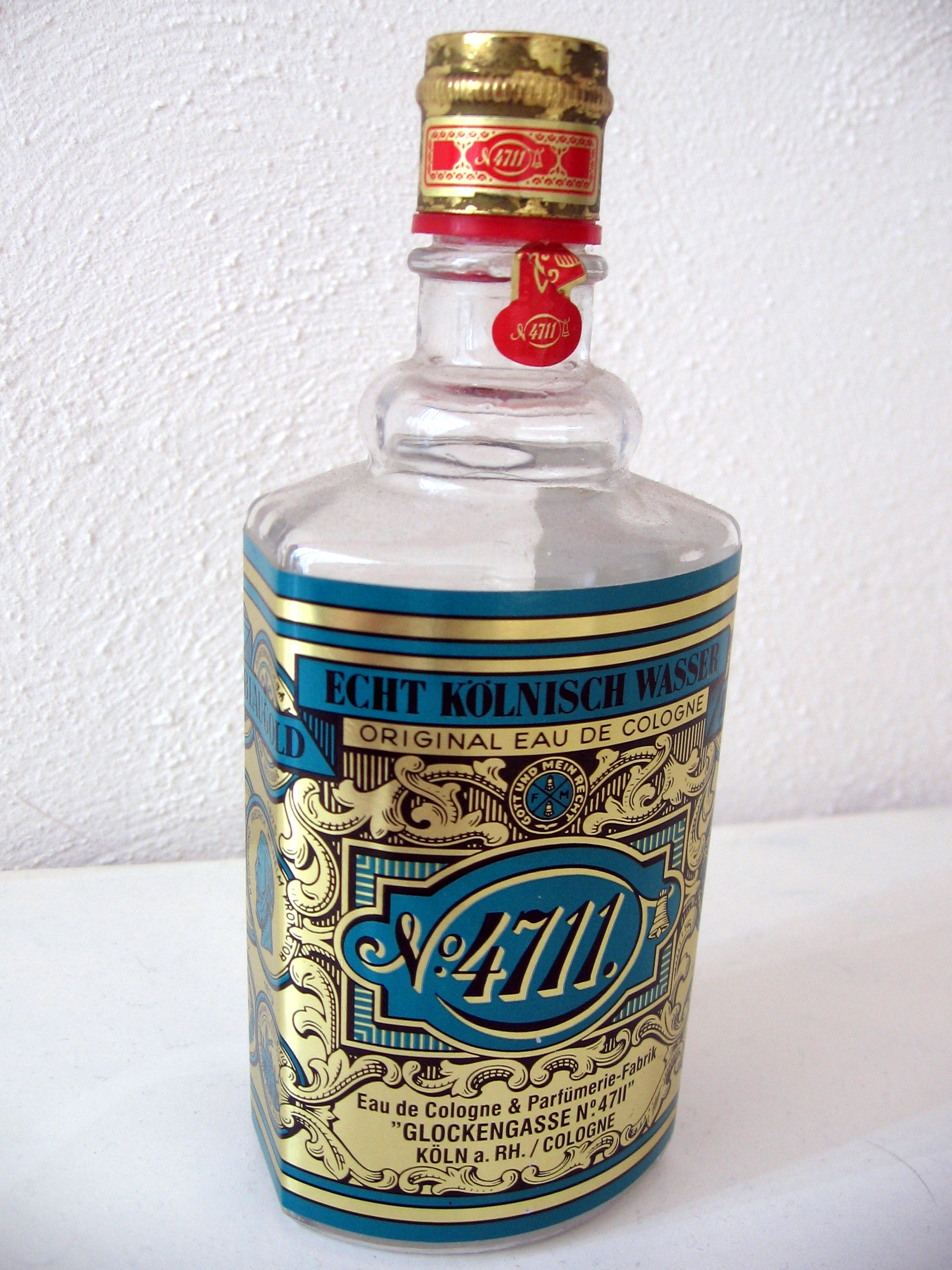 Eau de cologne